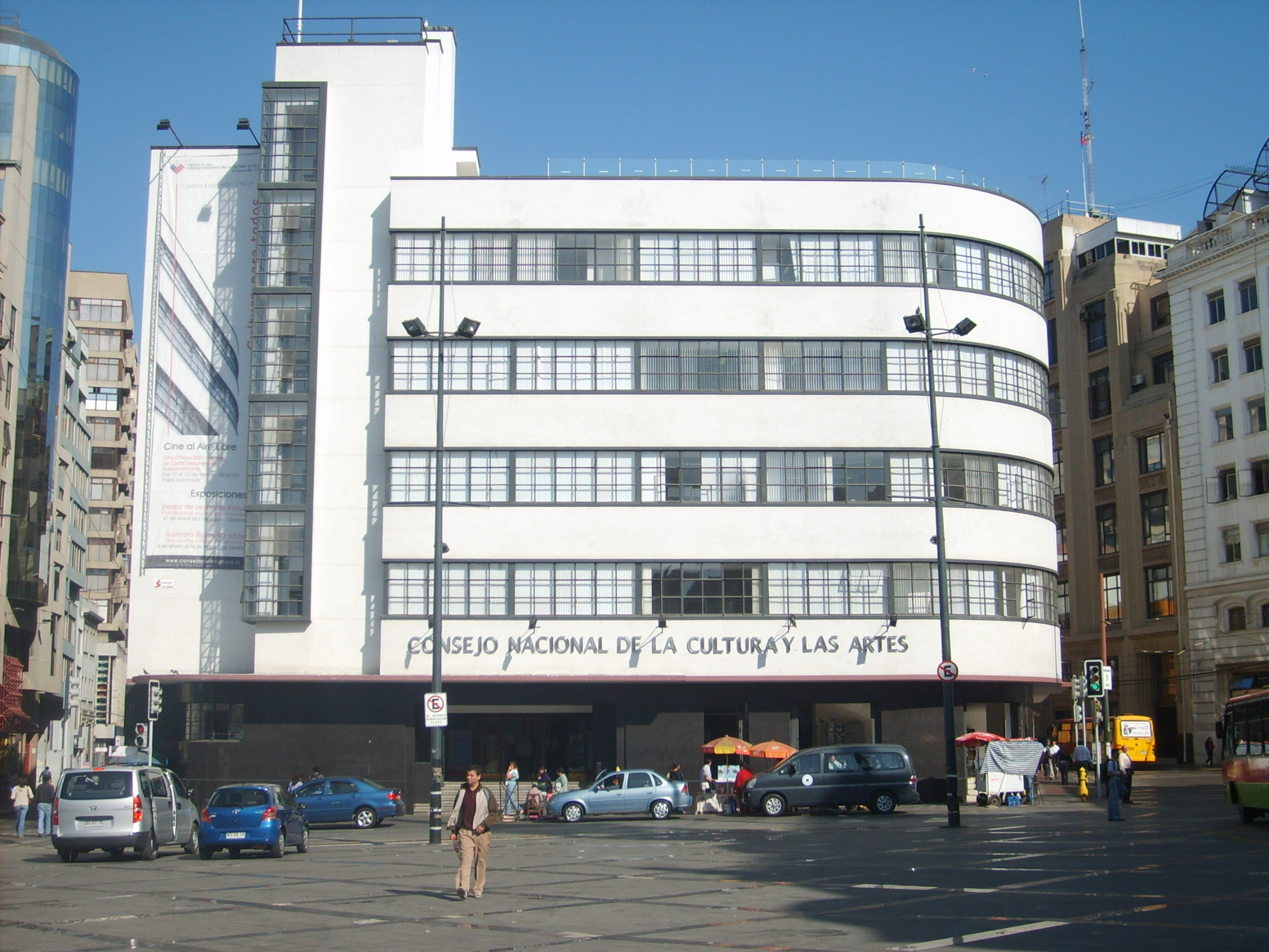 edificio del consejo nacional de la cultura y las artes ubicado en valparaiso